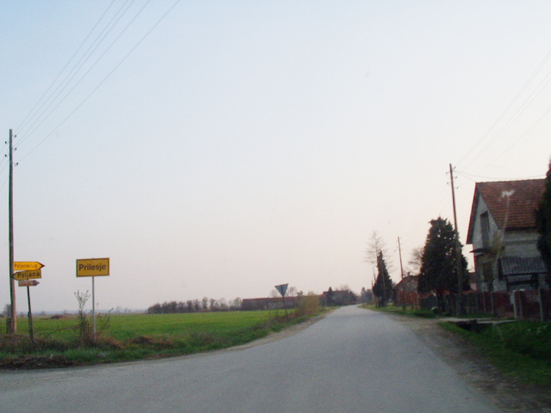 Prilesje - Ulaz